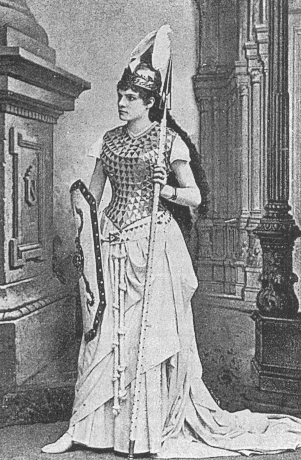 Ernest Reyer - Sigurd - Rose Caron as Brunehild - Paris about 1899